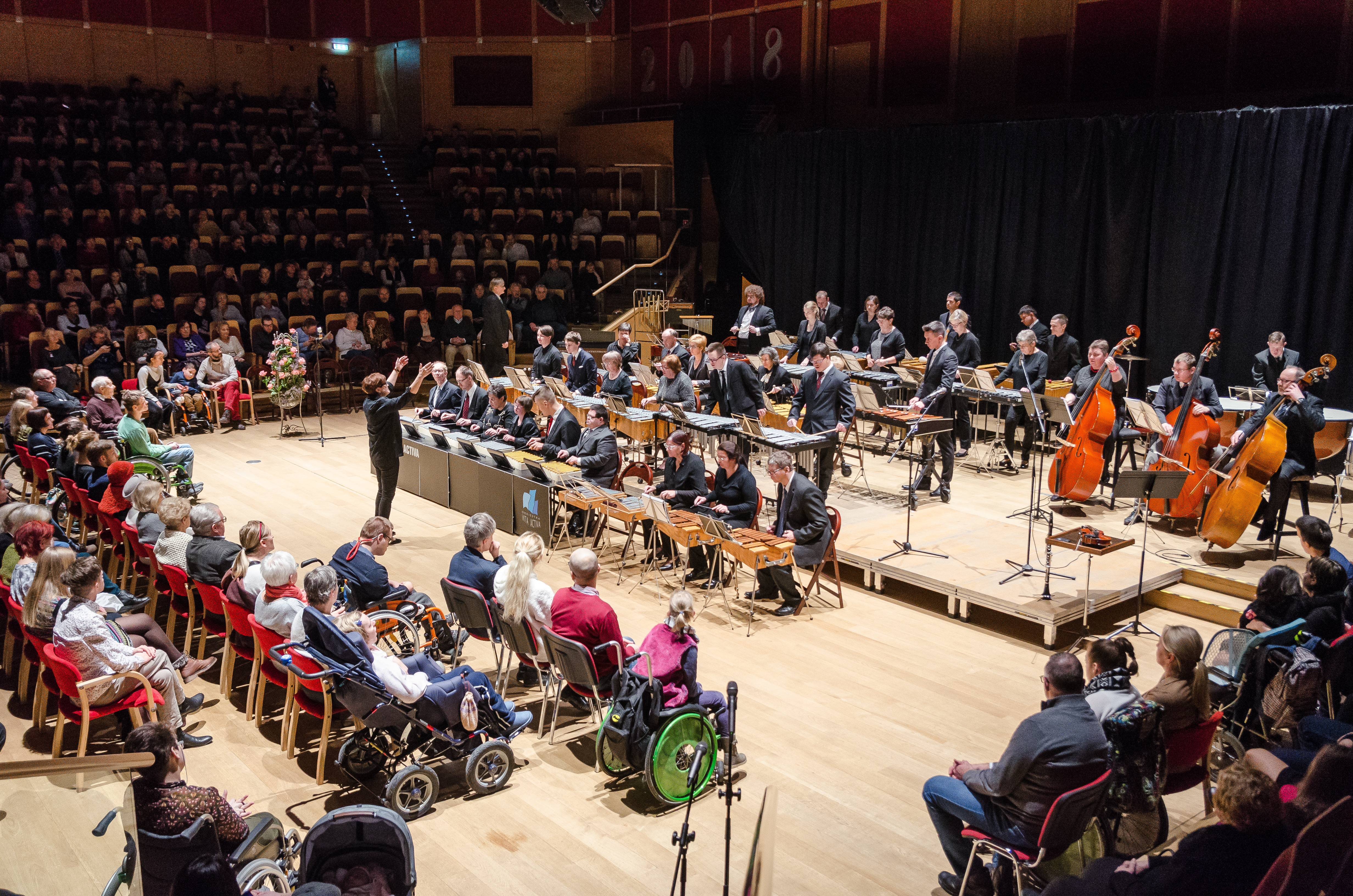 XIX Koncert Noworoczny Orkiestry Vita Activa - sala Polskiej Filharmonii Bałtyckiej w Gdańsku